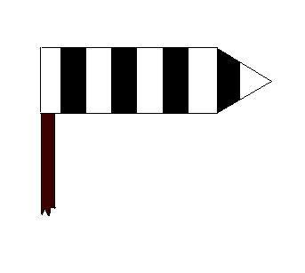 Sperrbaken für Steinfischerei an der schleswig-holsteinischen Ostseeküste gem. Polizeiverordnung vom 25. Juni 1890 Heinrich L.